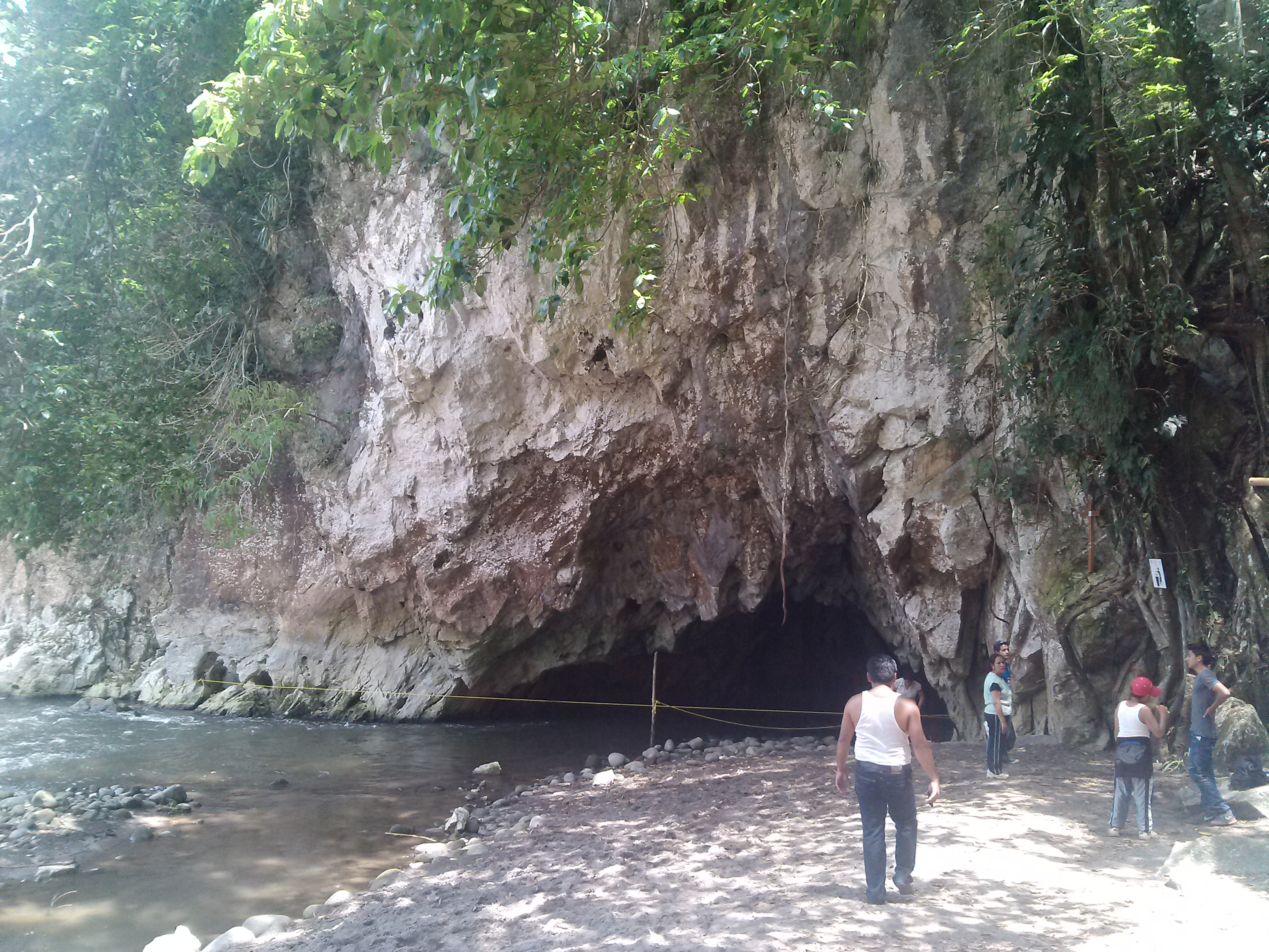 Vista del Boqerón